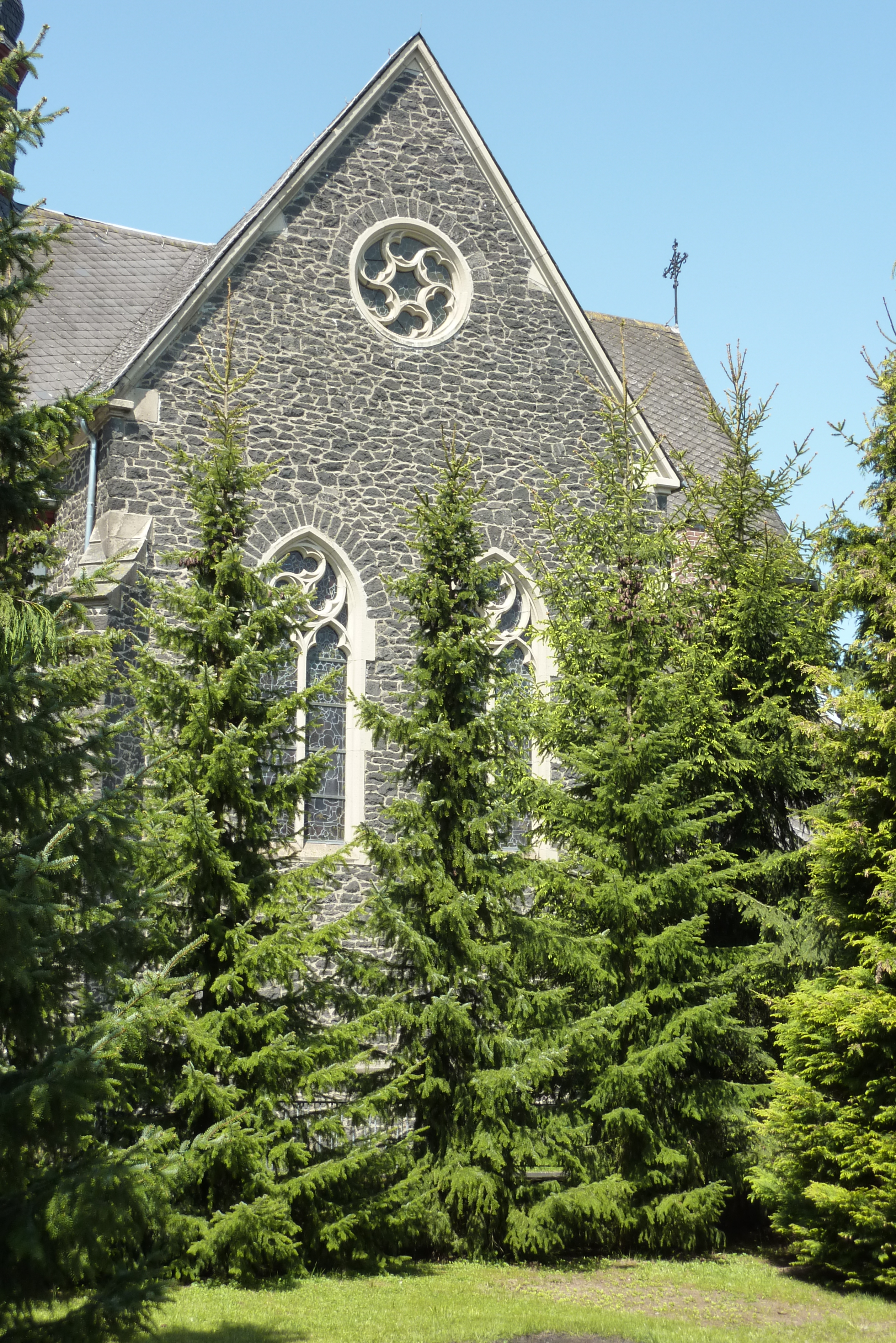 Pfarrkirche St. Kastor in Weiler (bei Mayen), Außenaufnahme des südlichen Querhauses